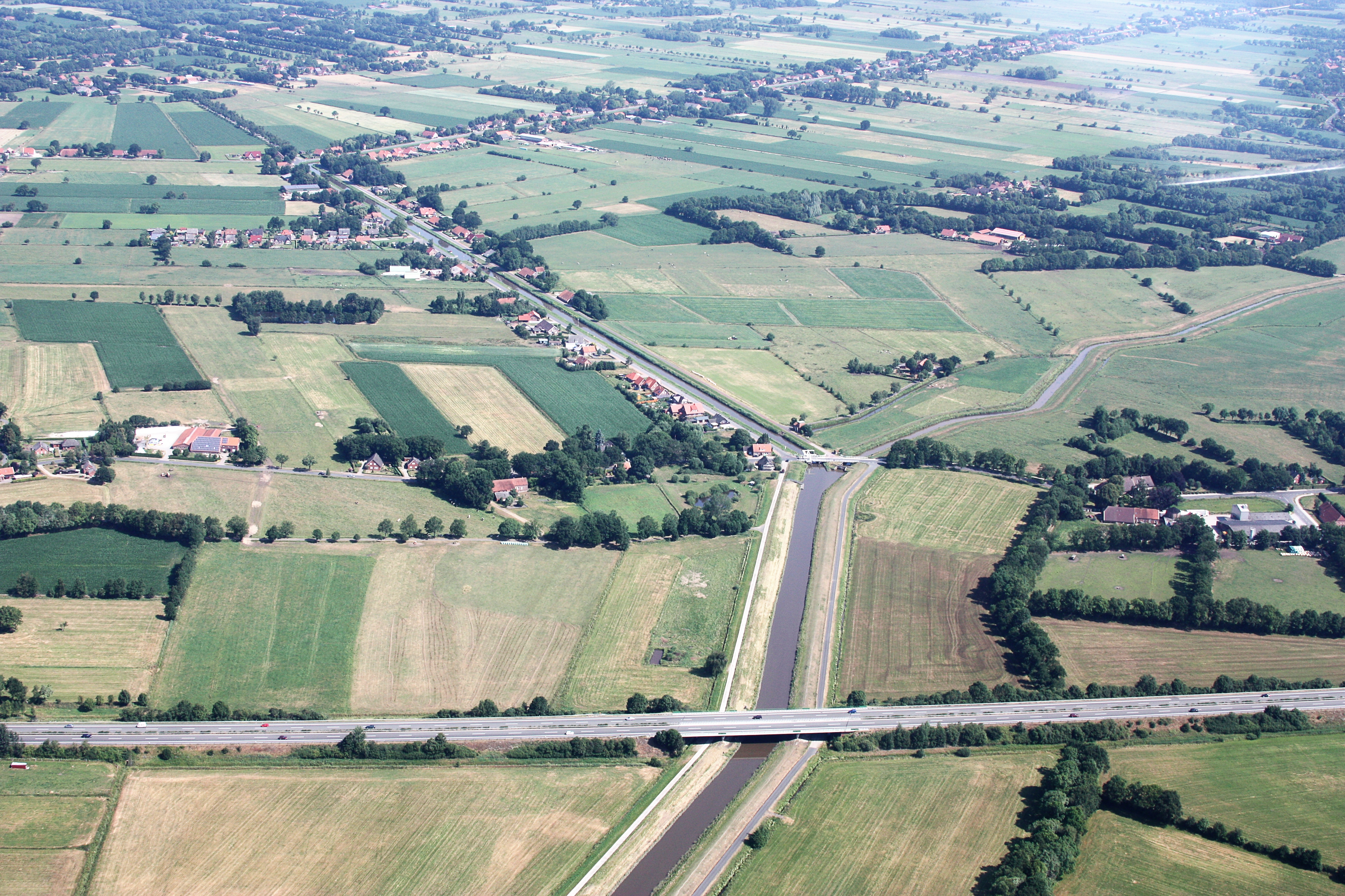 Luftaufnahme; Flug von Westerstede nach Leer; Flughöhe 1500 ft; Juli 2010; Originalfoto bearbeitet: Tonwertkorrektur und Bild geschärft mit Hochpassfilter